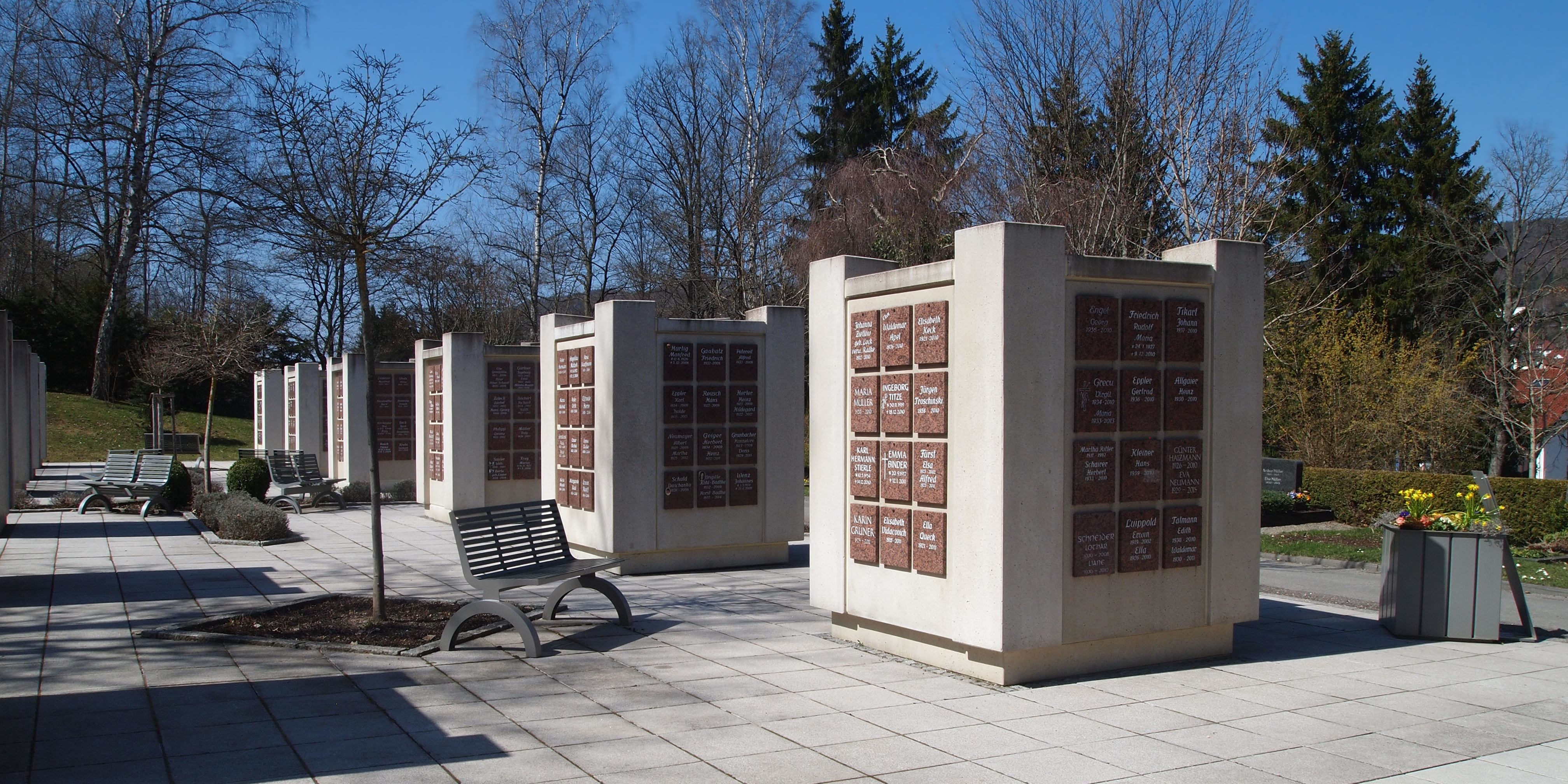 Kolumbarium auf dem Friedhof in Ebingen, in Form von Würfeln